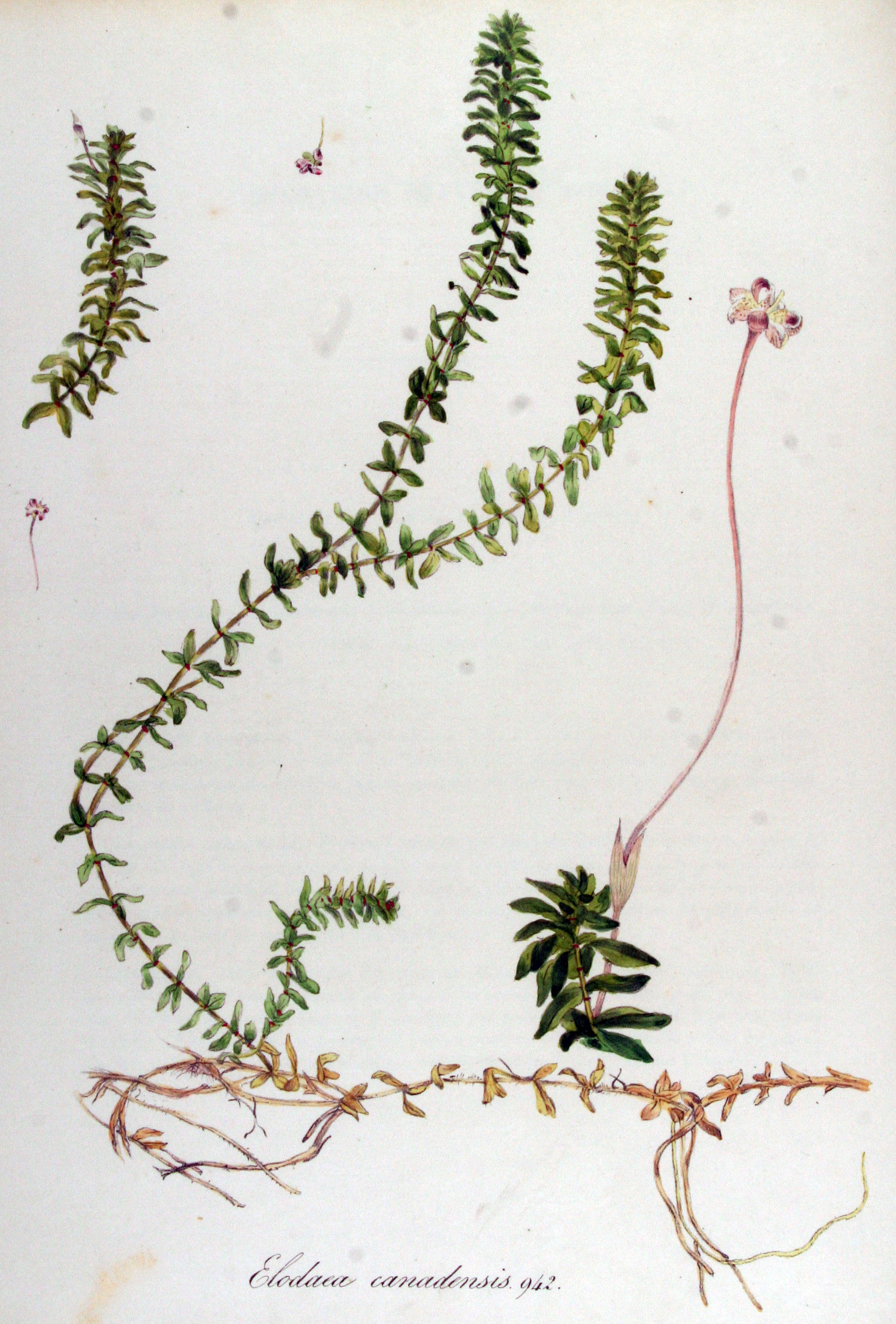 Elodea canadensis Michaux